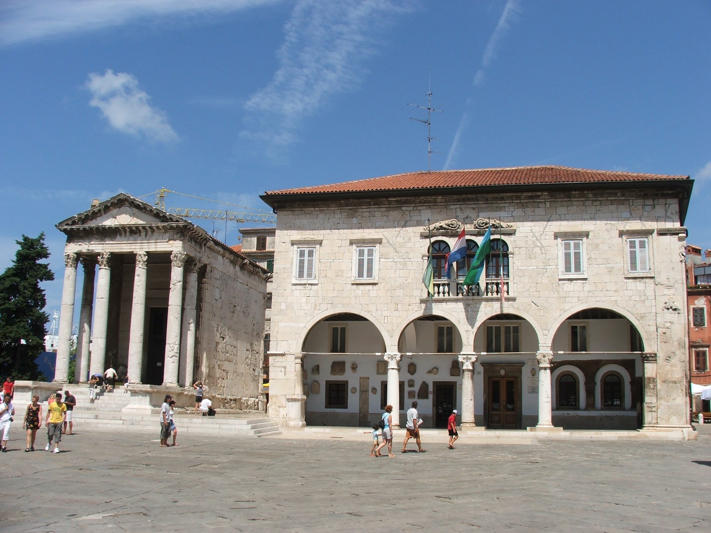 Der Augustus Tempel in Pula